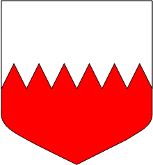 Parti dentelé d'argent et de gueules